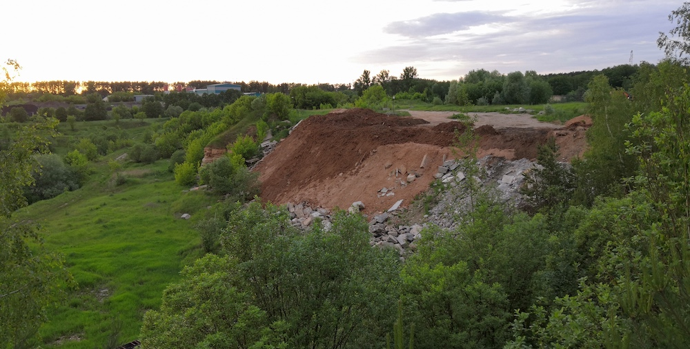 Карьер Заборье - памятник геологии, расположен в Московской области,городской округ Серпухов